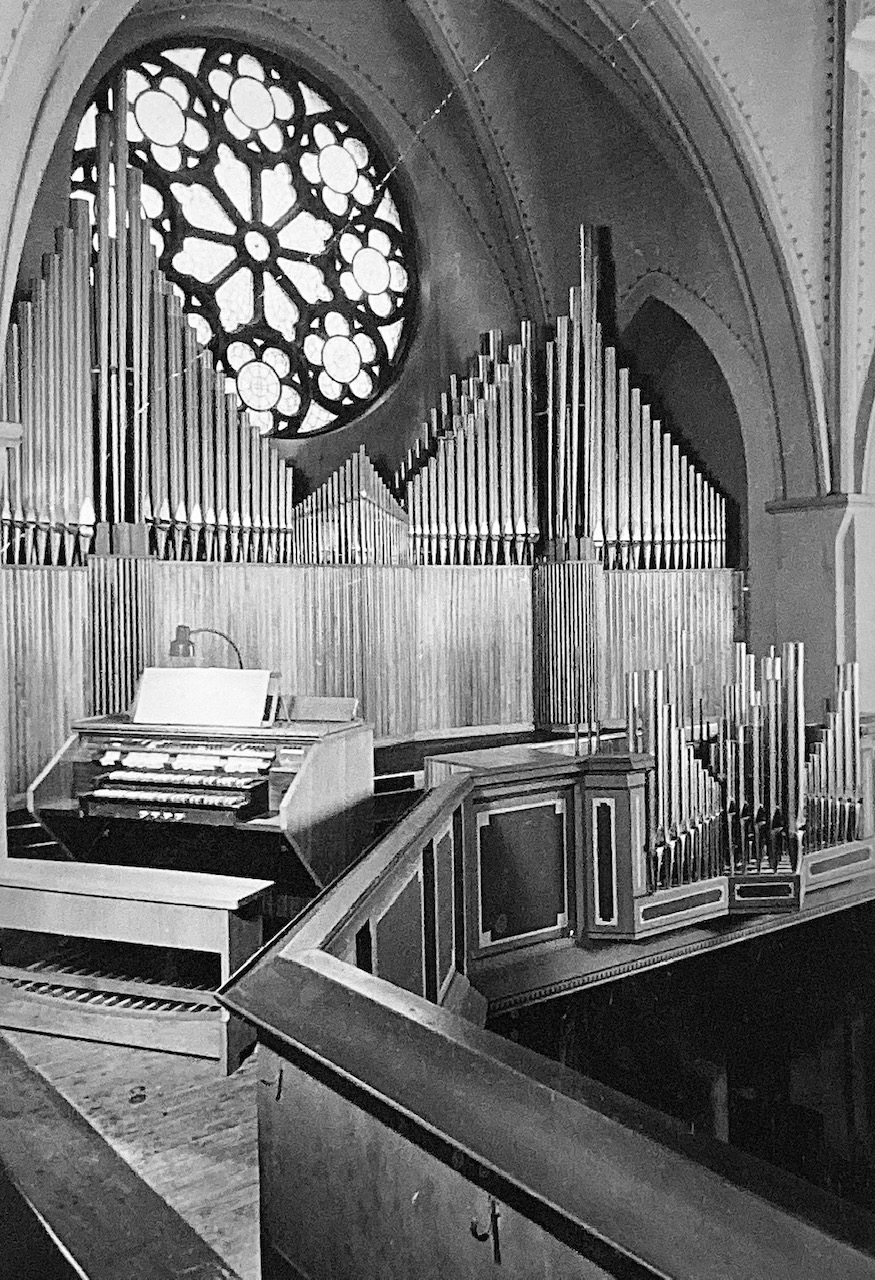 Kleuker-Orgel auf der Empore der Christuskirche (Fotografie 1956/Gemeindearchiv)